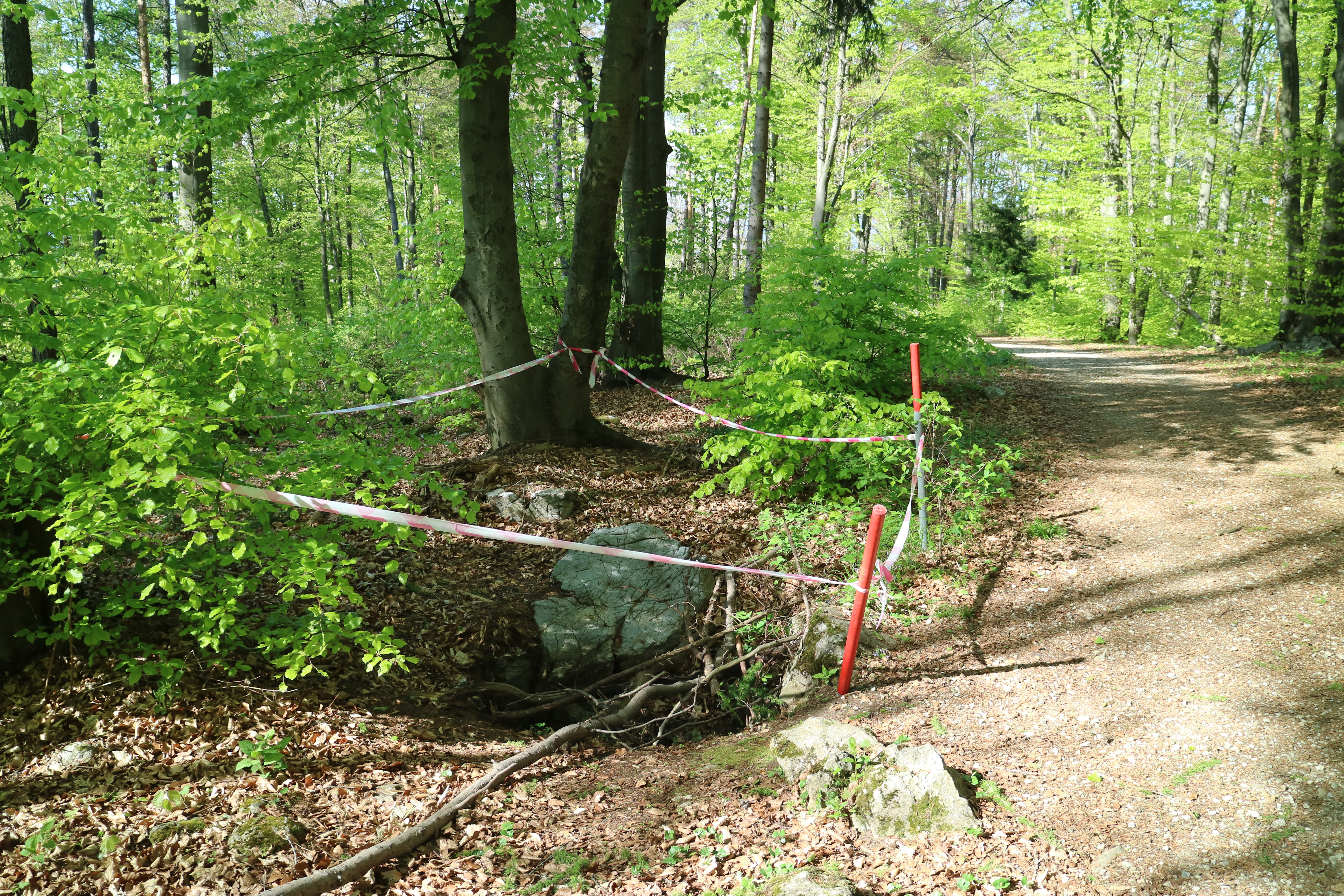 Pinge (?) am Buchkogel, Graz-Straßgang